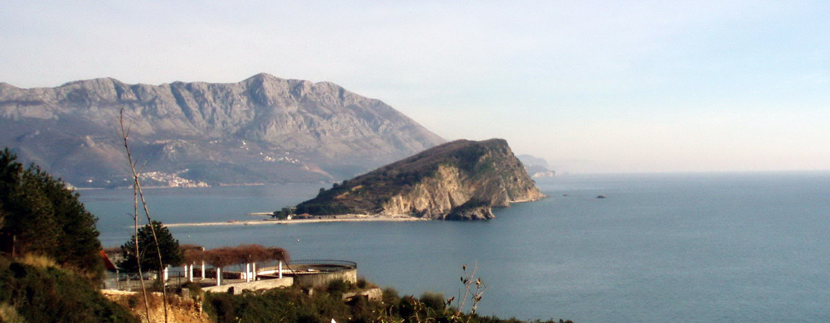 St. Nicolas